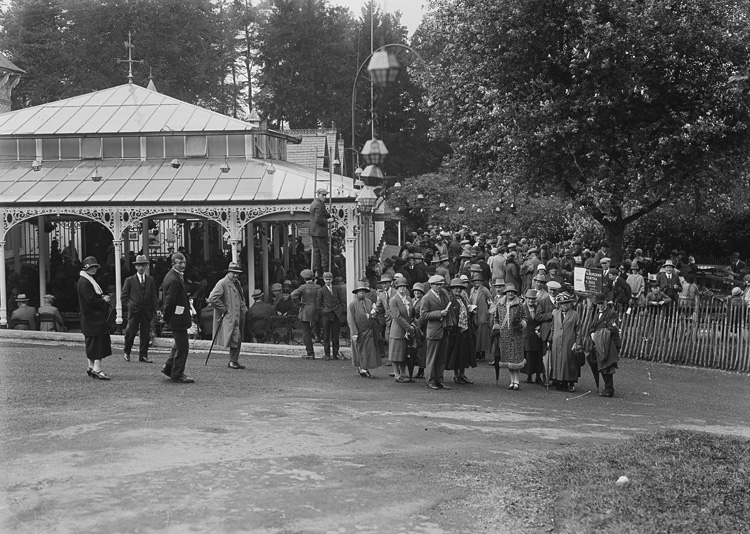 Ffotograffydd/Photographer: P B Abery (1877?-1948) Dyddiad/Date: [192-?] Cyfrwng/Medium: Negyddion gwydr / Glass negatives Maint/Dimensions: 119 x 163 mm. Cyfeiriad/Reference:PBA39/3 Rhif cofnod / Record no.: 4518226 Rhagor o wybodaeth am gasgliad P B Abery yn Llyfrgell Genedlaethol Cymru More information about the P B Abery Collection at the National Library of Wales